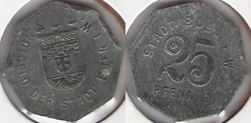 Moneda de necesidad de Buer in Westfalen, actualmente parte de Gelsenkirchen, emitida en 1918.